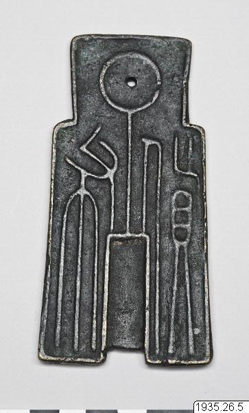 1935.26.0005 Amulettmynt av brons i form av spadmynt. På ena sidan inskription omgiven av fyra drakar, på andra sidan stiliserade tecken. China.